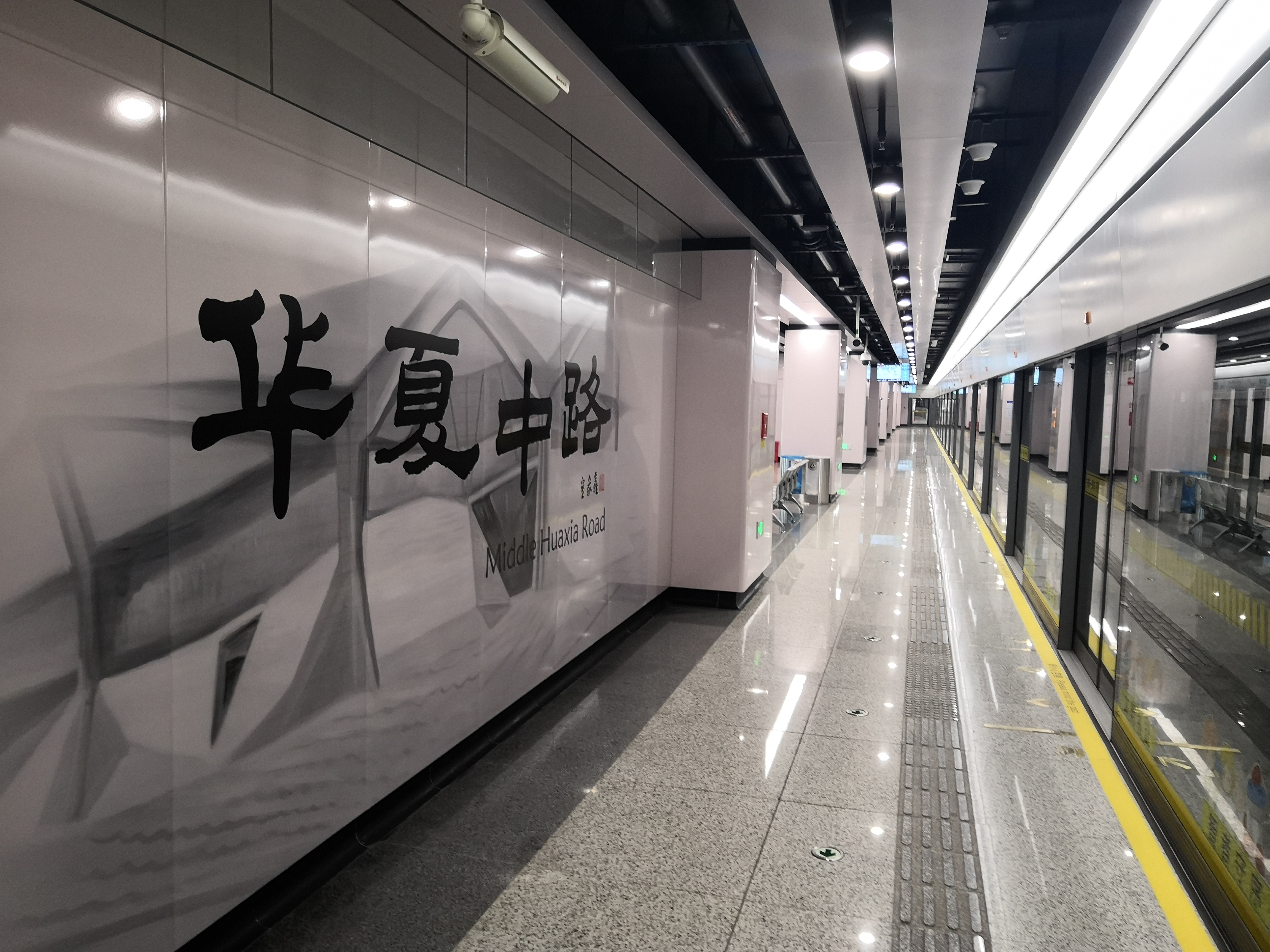 13号线华夏中路站台